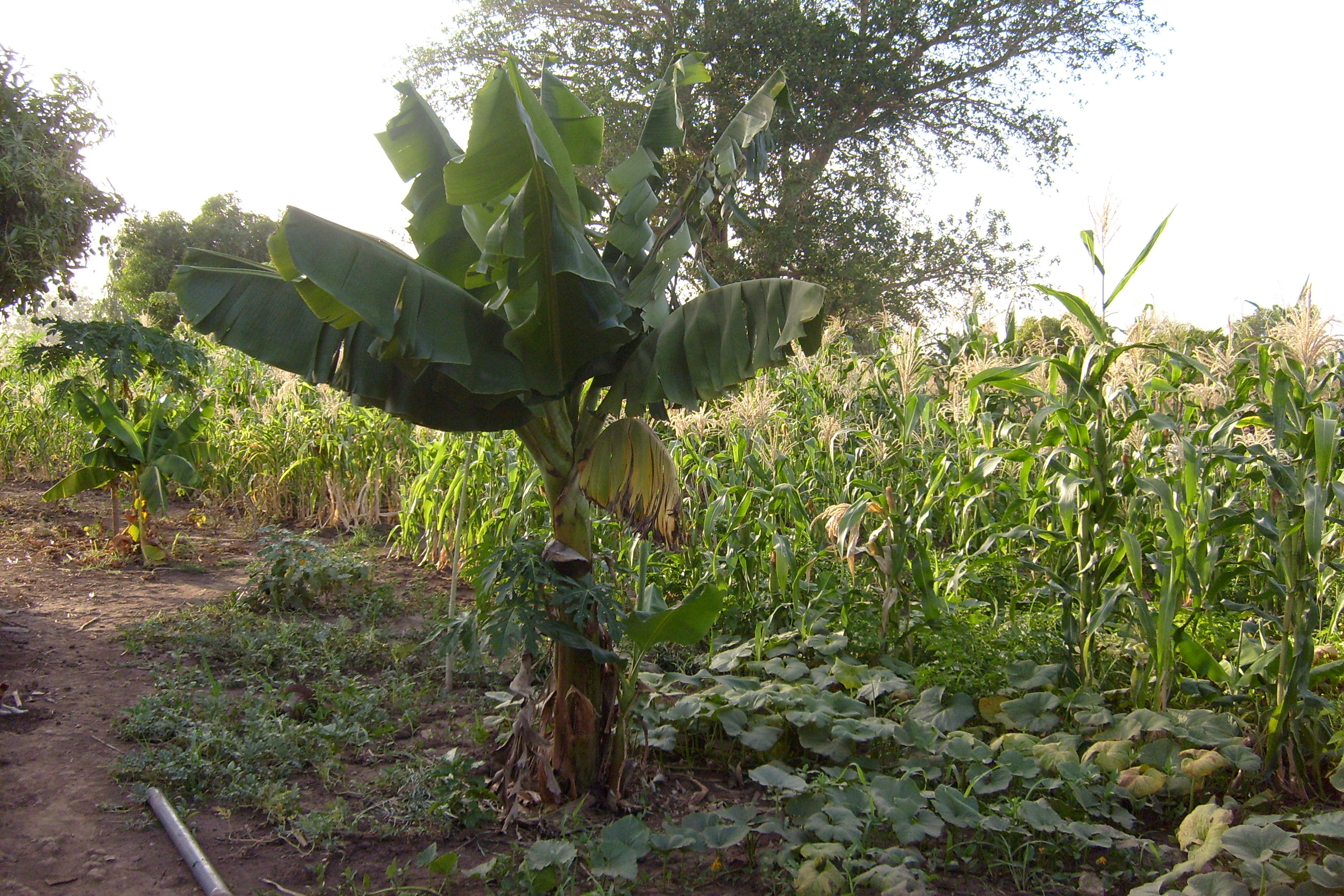 Bananier at agrosylviculture à Kédougou (Sénégal)